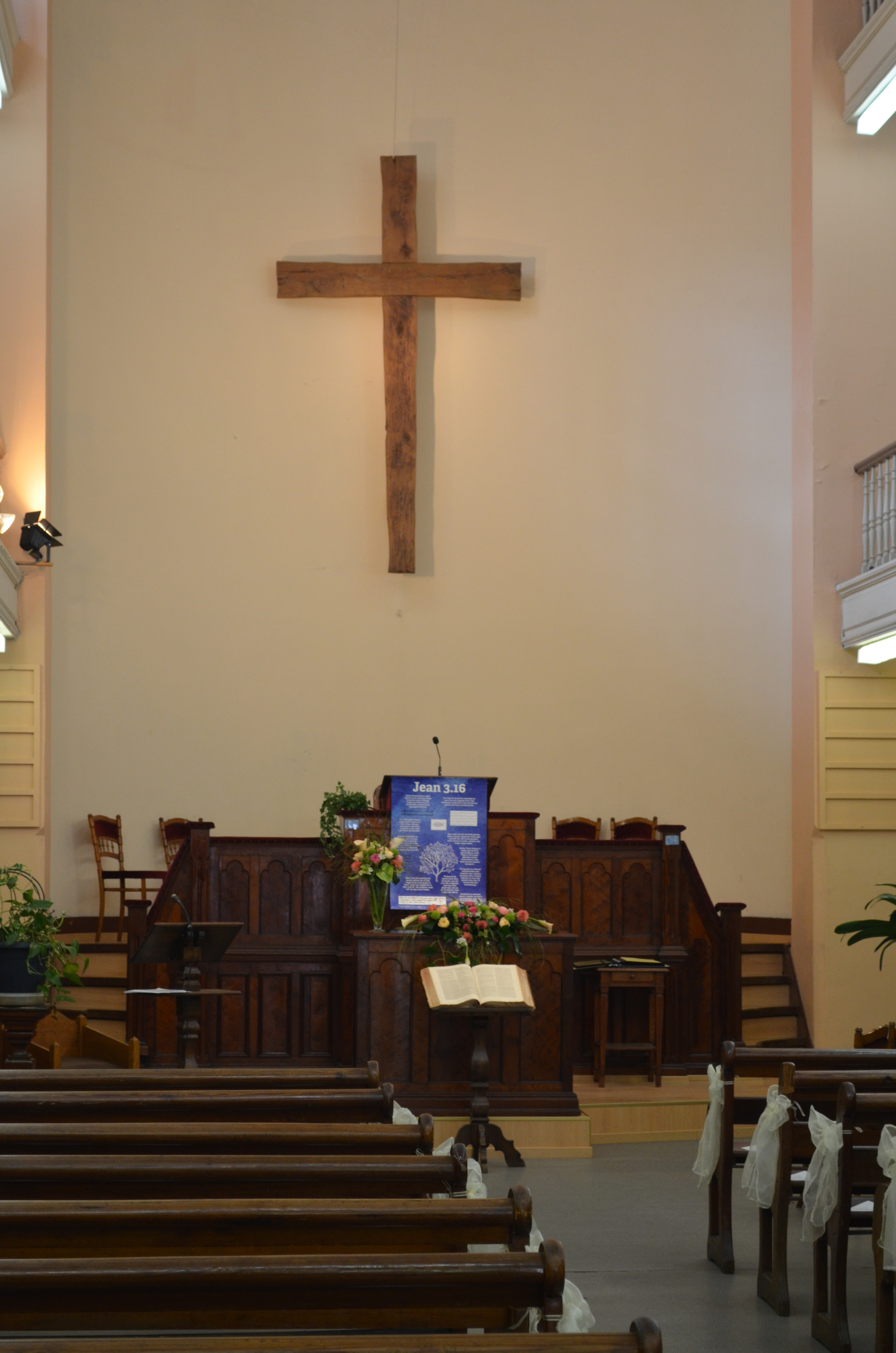 Charleroi (Belgique) - Temple protestant - Construction 1880 - architecte E. Dubois. Bâtiment classé en 1990.